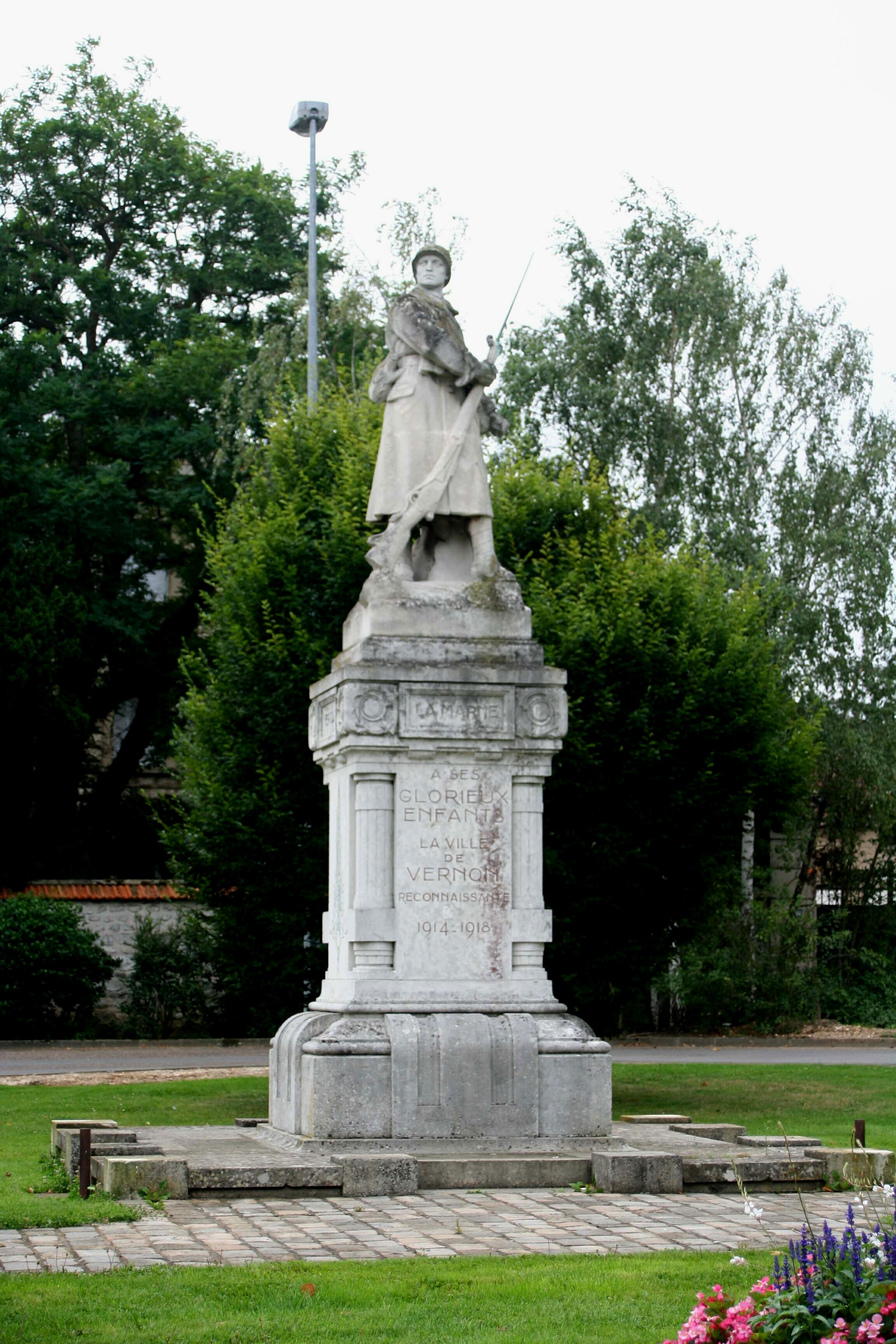 Monuments aux morts de Vernon, Eure (France)